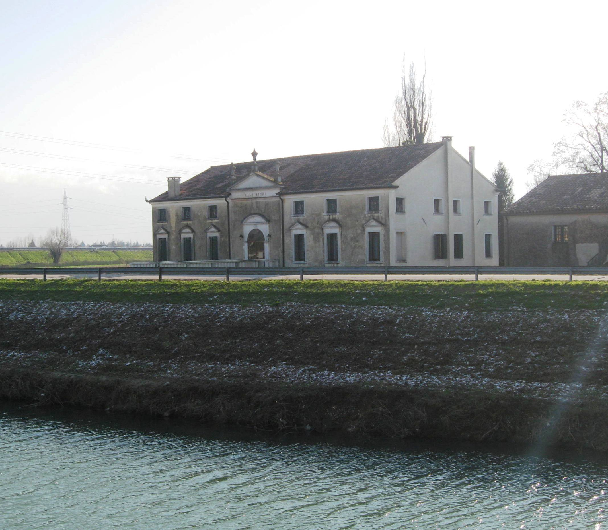 Villa Gemma a Noventa Padovana